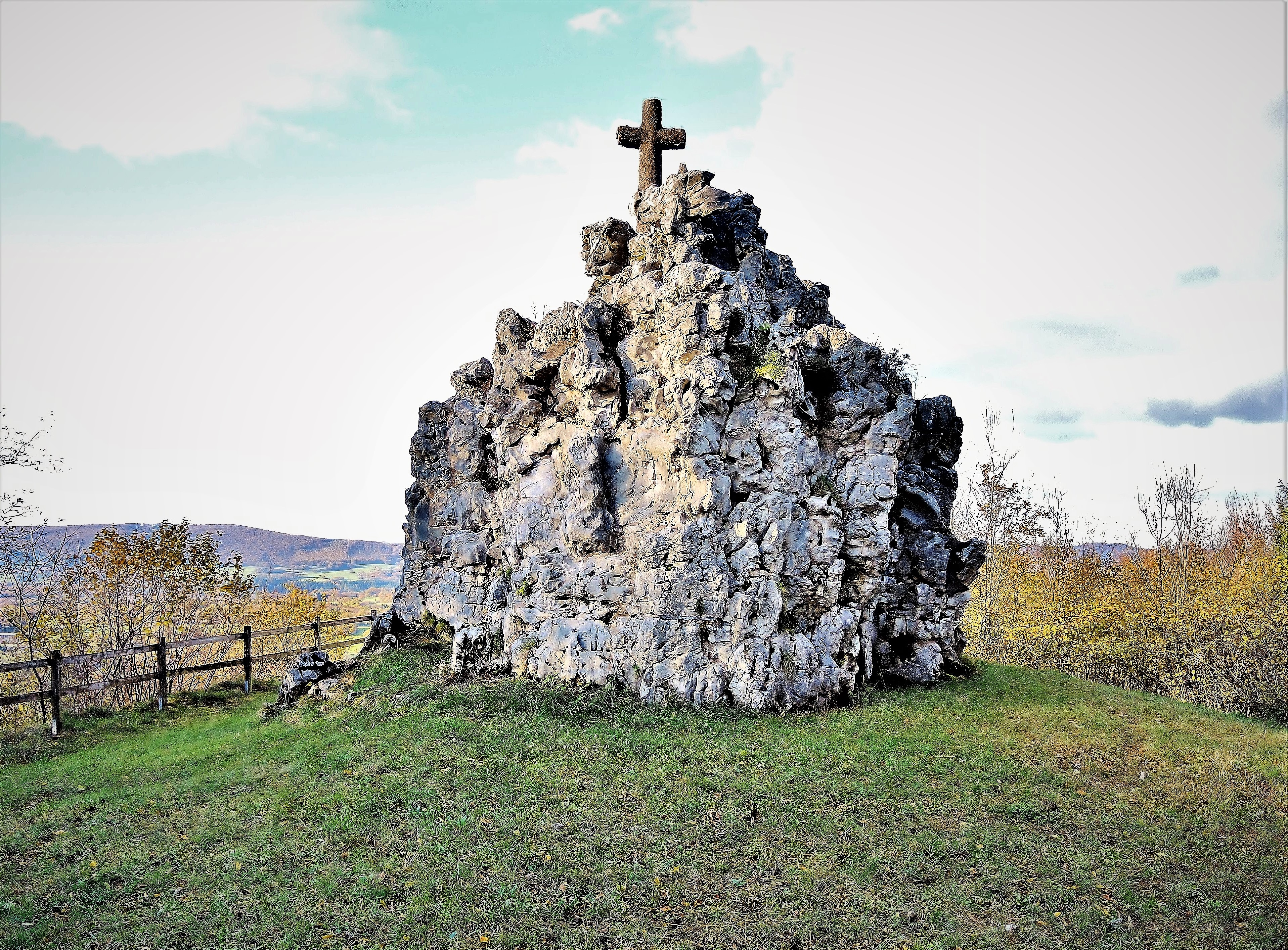 Calvaire de Rochandeux. saint-Juan. Doubs